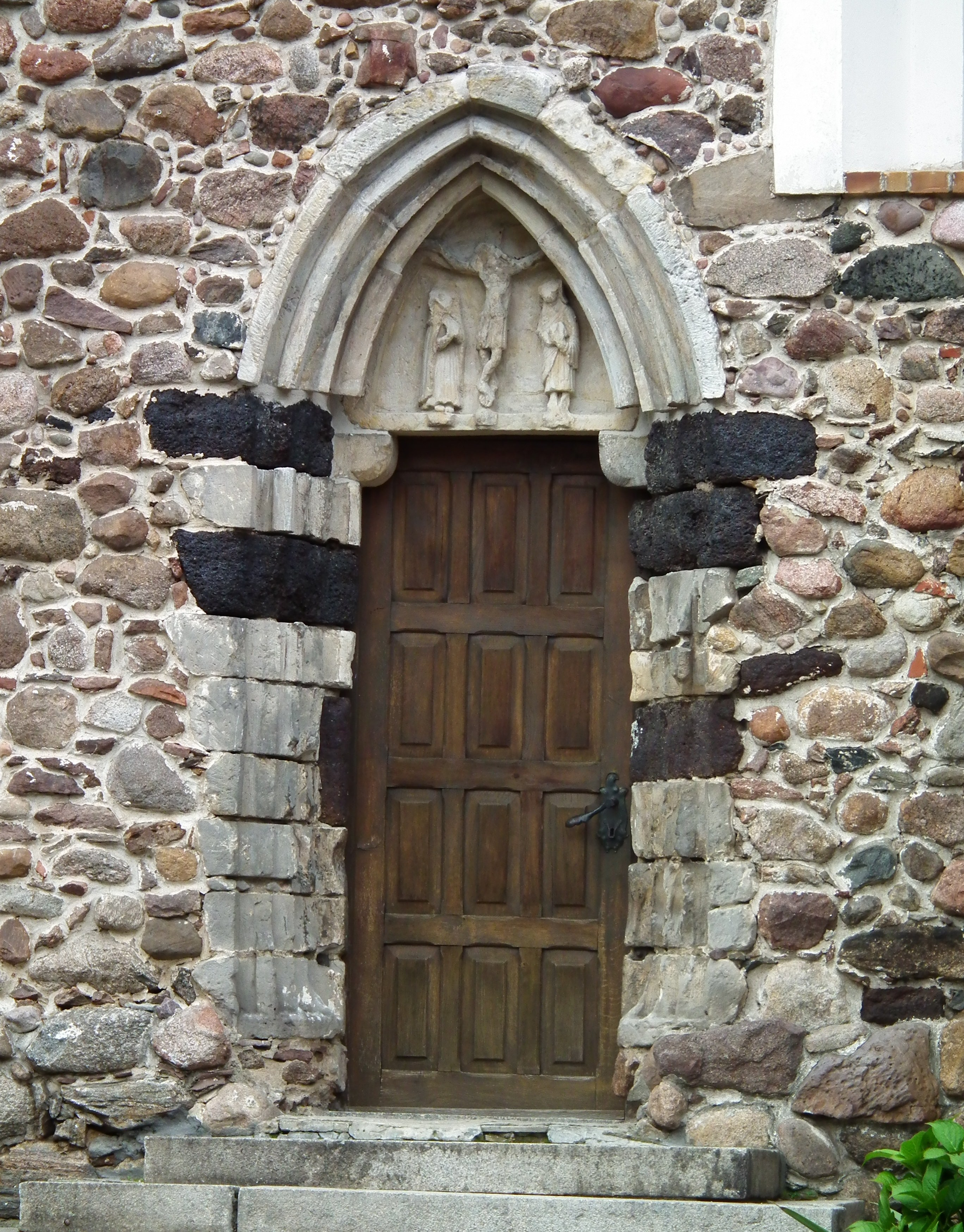 Kościół Matki Boskiej Rokitniańskiej i św. Michała Archanioła w Witkowie.